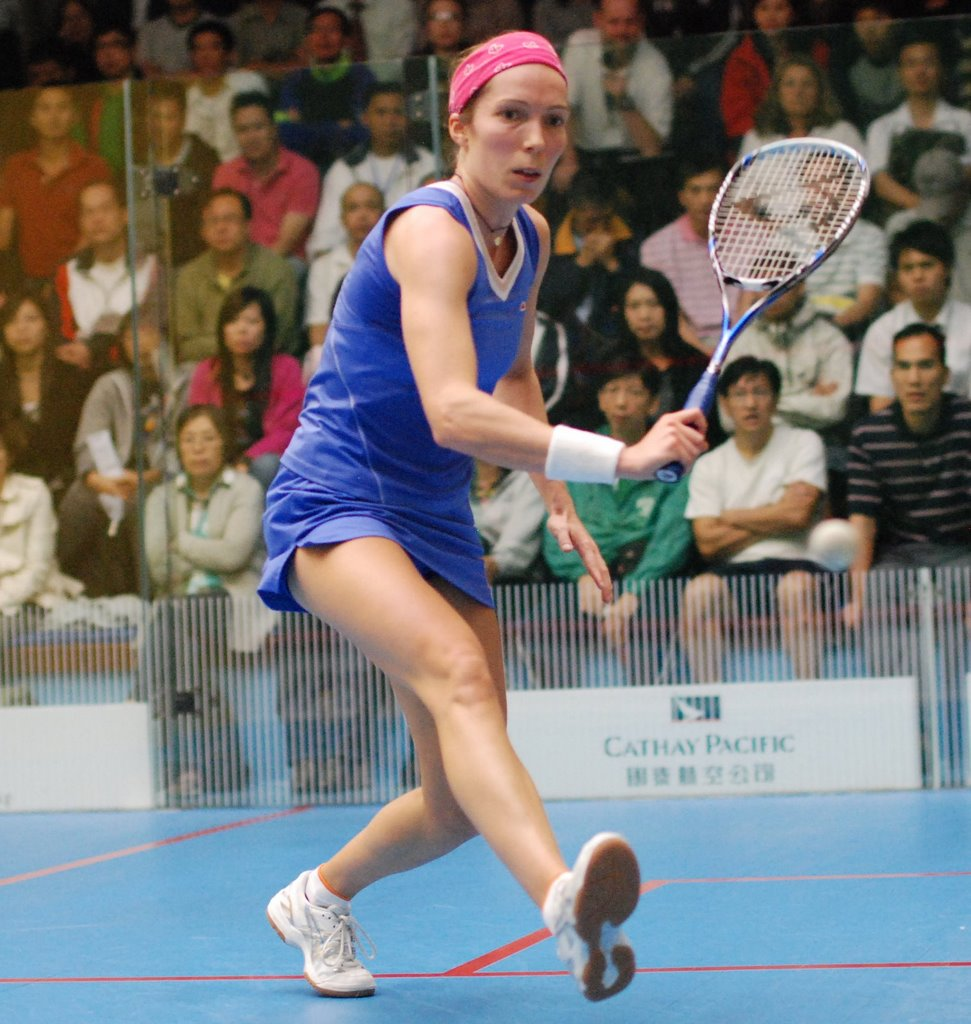 Madeline Perry during Hong Kong Open 2009